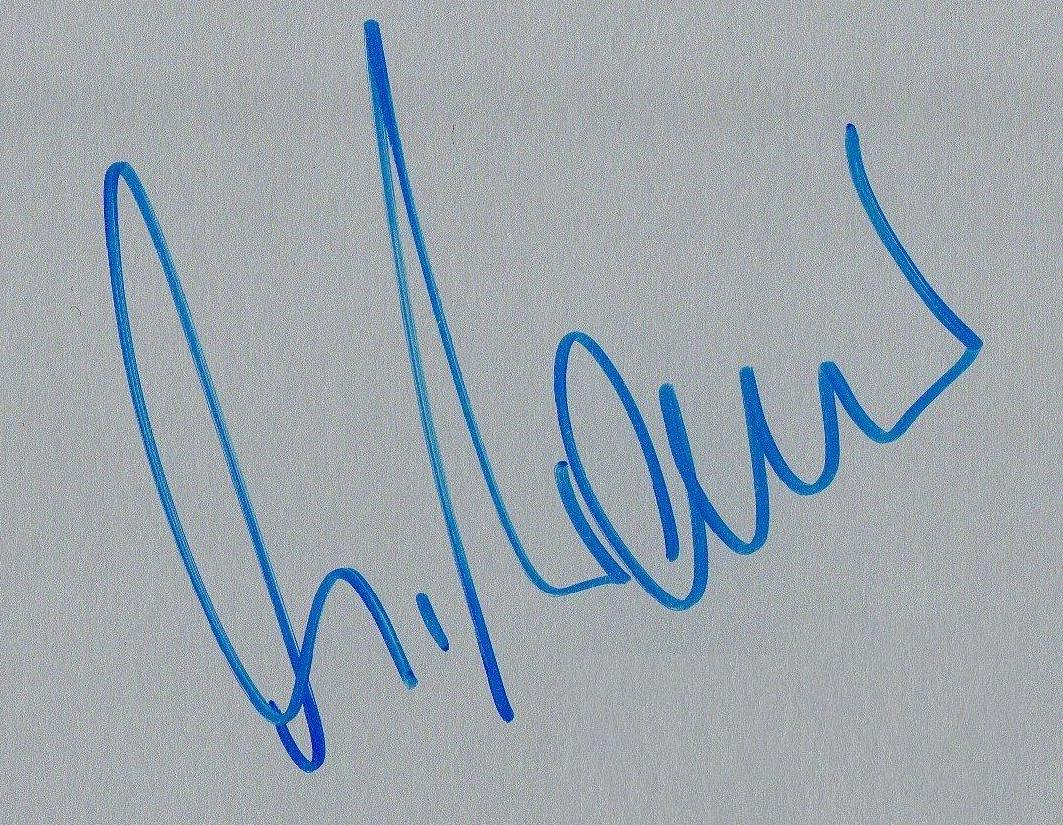 Autogramm von Marco Werner